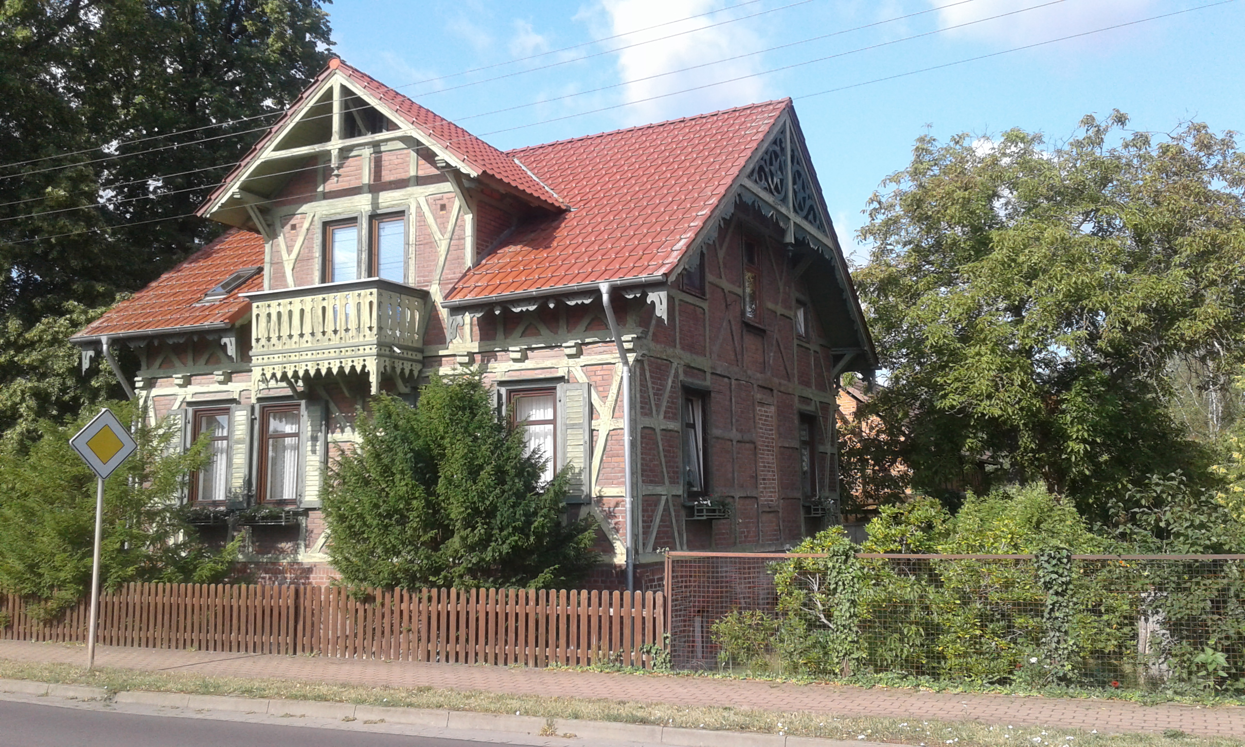 Wohnhaus